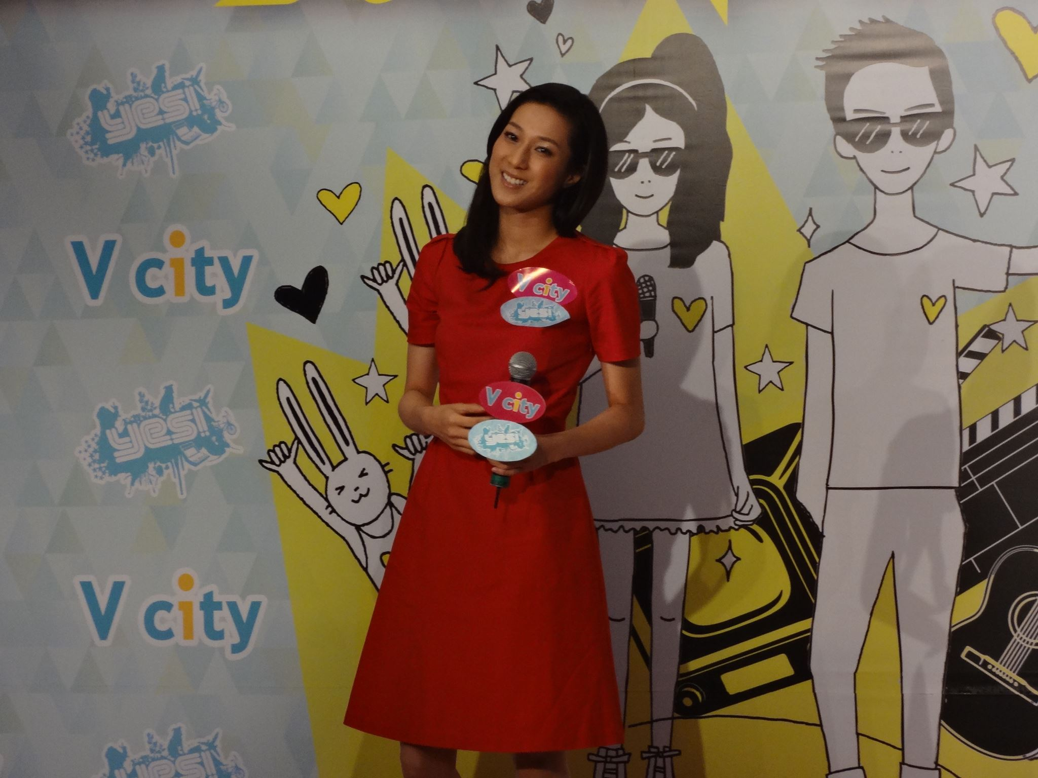 中文（香港）: Linda Chung